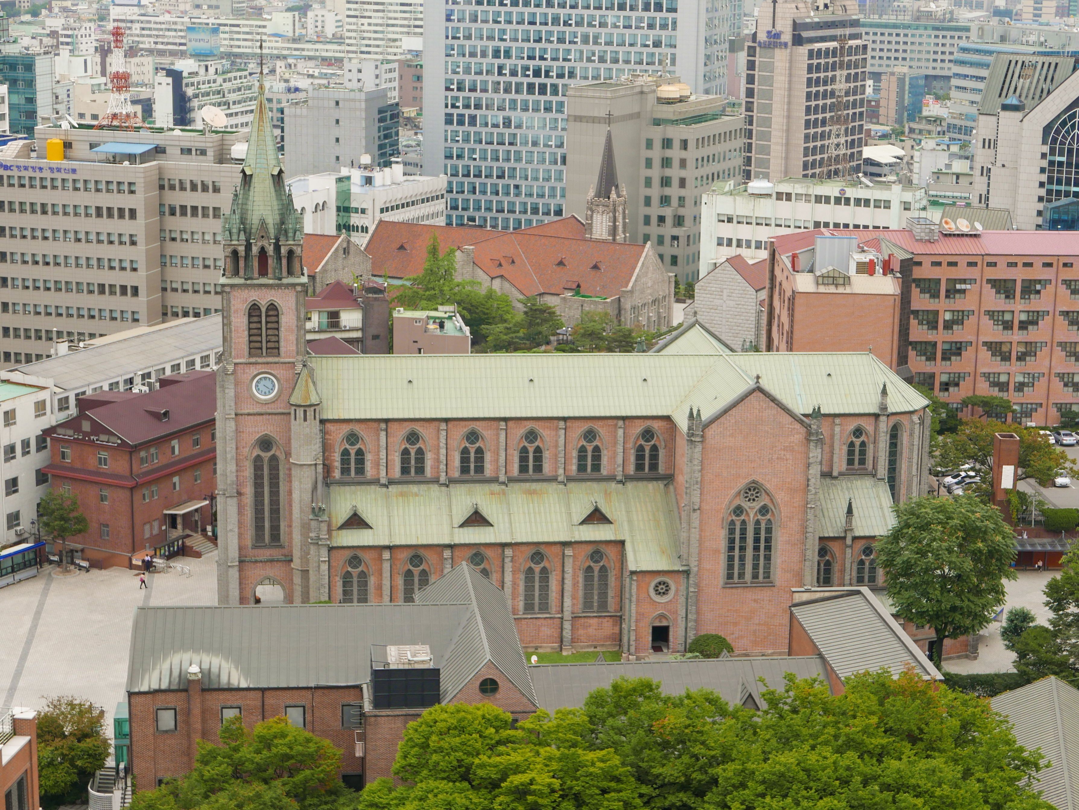 明洞大聖堂 （「ソラリア西鉄ホテル ソウル明洞」 22Fベランダより）